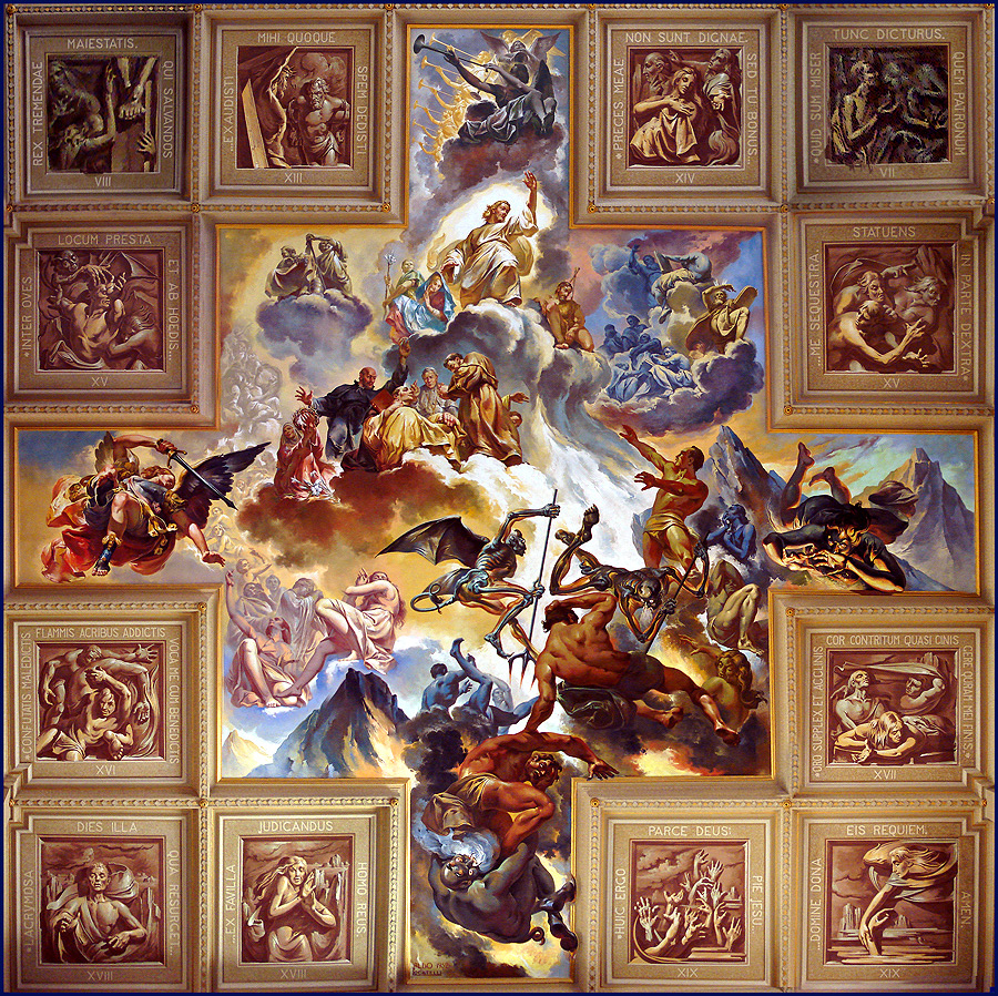 Juízo Final e cenas do Dies Irae. Teto da Igreja de São Pelegrino, Caxias do Sul, Brasil. Obra de Aldo Locatelli na década de 50-60. Os quadros em volta apresentam ligeiras distorções devido aos ângulos diversos com que foram tomadas as 8 fotos usadas para esta montagem (manual, photoshop).